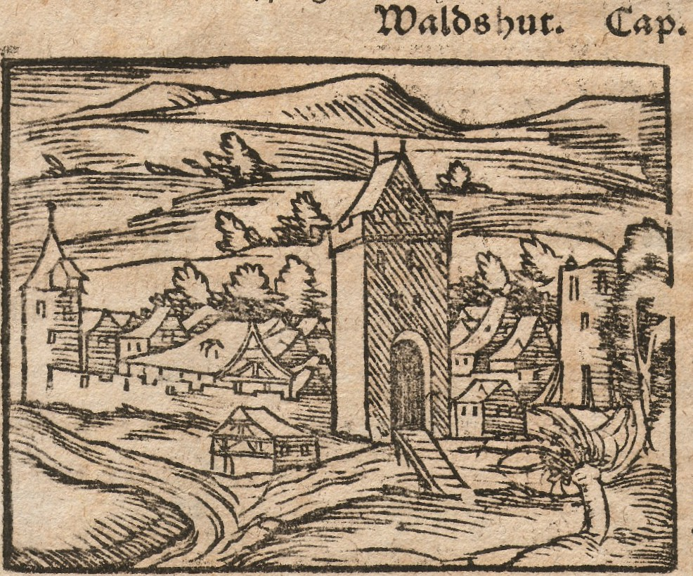 Waldshut um 1580, aus der Cosmographie von Sebastian Münster